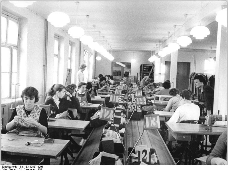 Zentralbild-Biscan Ne-Qu 31.12.1959 Bekleidungswerk Bormann in einer neuen Produktionsstätte. Das weit über die Grenzen der DDR hinaus bekannte Bekleidungswerk Heinz Bormann in Magdeburg hat seit Aufnahme staatlicher Beteiligung einen gewaltigen Aufschwung genommen. Die Zahl der Beschäftigten konnte auf 310 gesteigert werden, der Umsatz erreichte 300 Prozent. Dieser Tage wurde die Produktion aus einer kleinen Anlage in Schönebeck in eine große moderne Produktionsstätte in Magdeburg verlegt. Dem Betrieb ist es nun möglich, sich noch weiter auszuweiten und noch mehr Kleider für den Inlandsbedarf und Export zu produzieren. UBz.: Blick in einen der beiden Foren Maschinensäle, in dennen Varionbänder alle Arbeitsplätze verbinden und jeden überflüssigen Materialtransport aussehalten.